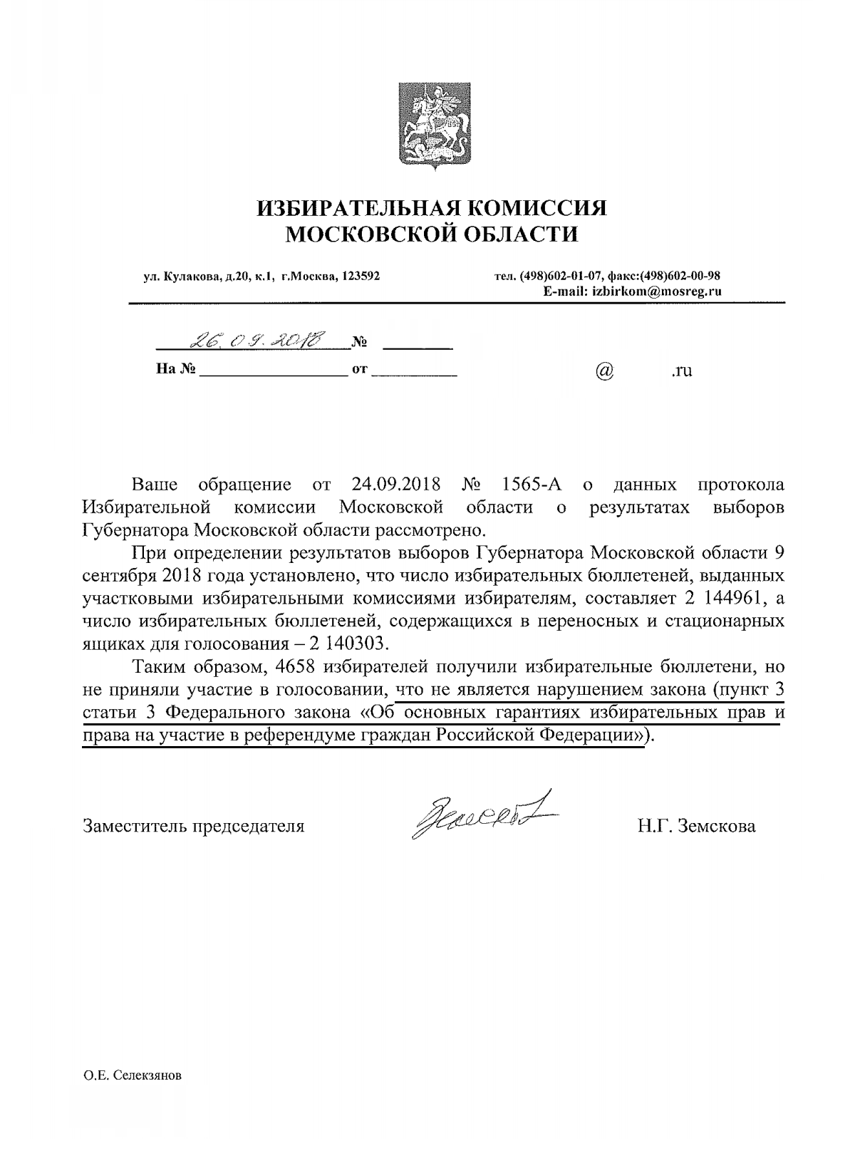 Ответ Московской избирательной комиссии об избирательных бюллетенях, не найденных при подсчёте результатов выборов.